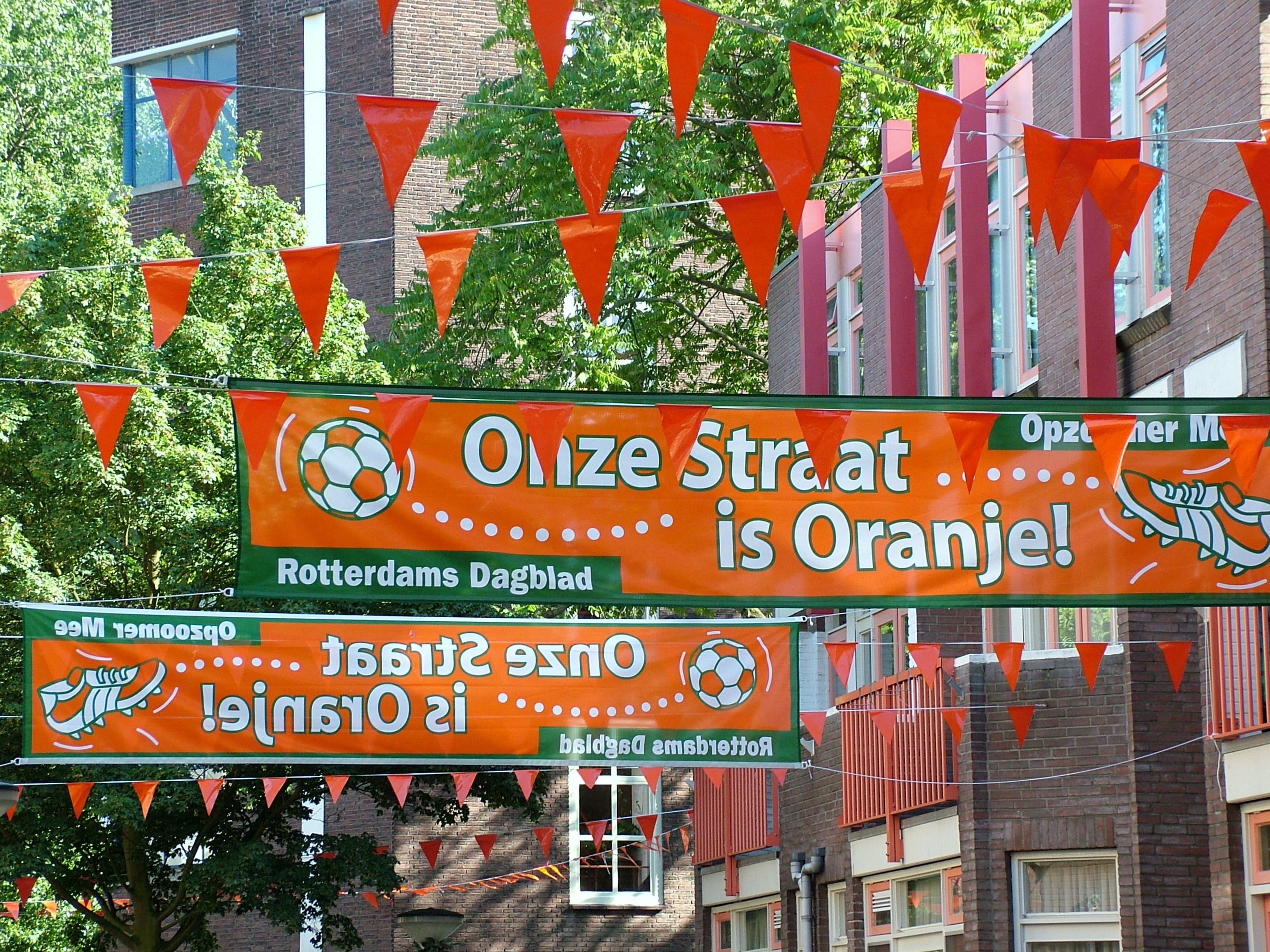 Oranjefieber, Rotterdam